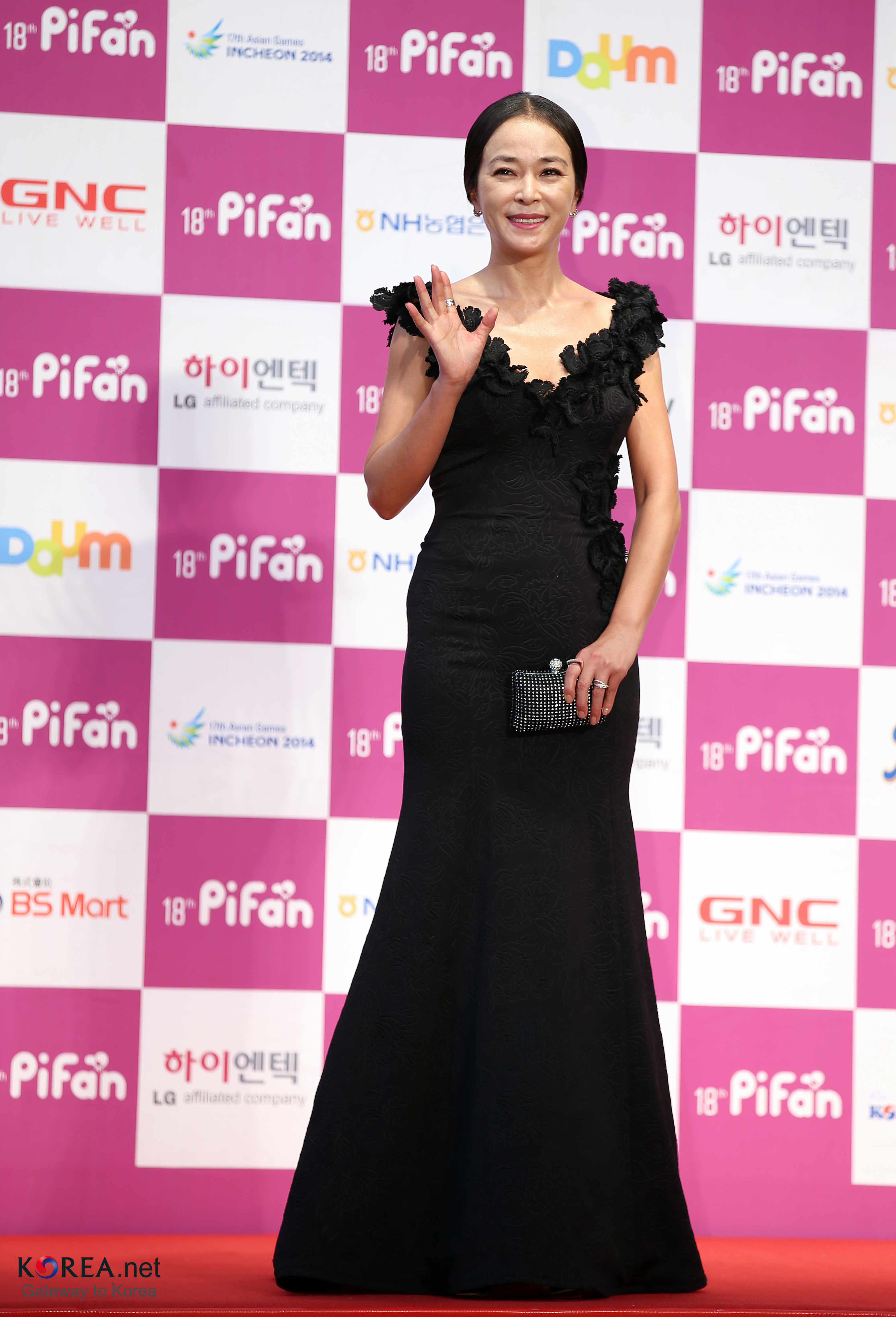 18th Puchon International Fantastic Film Festival (Pifan) Actress Jo Min-su poses for a photo on the red carpet at the Pifan opening ceremony on July 17. Jo is one of judges on the “Puchon Choice: Feature” award panel. July 17, 2014 Bucheon, Gyeonggi-do -Related Article- - -English- Film festival kicks off in Bucheon Ministry of Culture, Sports and Tourism Korean Culture and Information Service ( Official Photographer: Jeon Han This official Republic of Korea photograph is CC-BY-SA-2.0-licensed, so while restrictions such as personality or privacy rights may apply, in general, manipulations are allowed. If you require a photograph without a watermark, please use Flickr e-mail. 제18회 부천국제판타스틱영화제(Pifan) 제18회 부천국제판타스틱영화제 개막식이 열린 17일 배우 조민수가 레드카펫 포토월에서 인사를 하고 있다. 조민수는 이번 영화제에서 심사위원을 맡았다. 2014-07-17 부천체육관(경기도 부천시 원미구 중동) 문화체육관광부 해외문화홍보원 코리아넷 전한